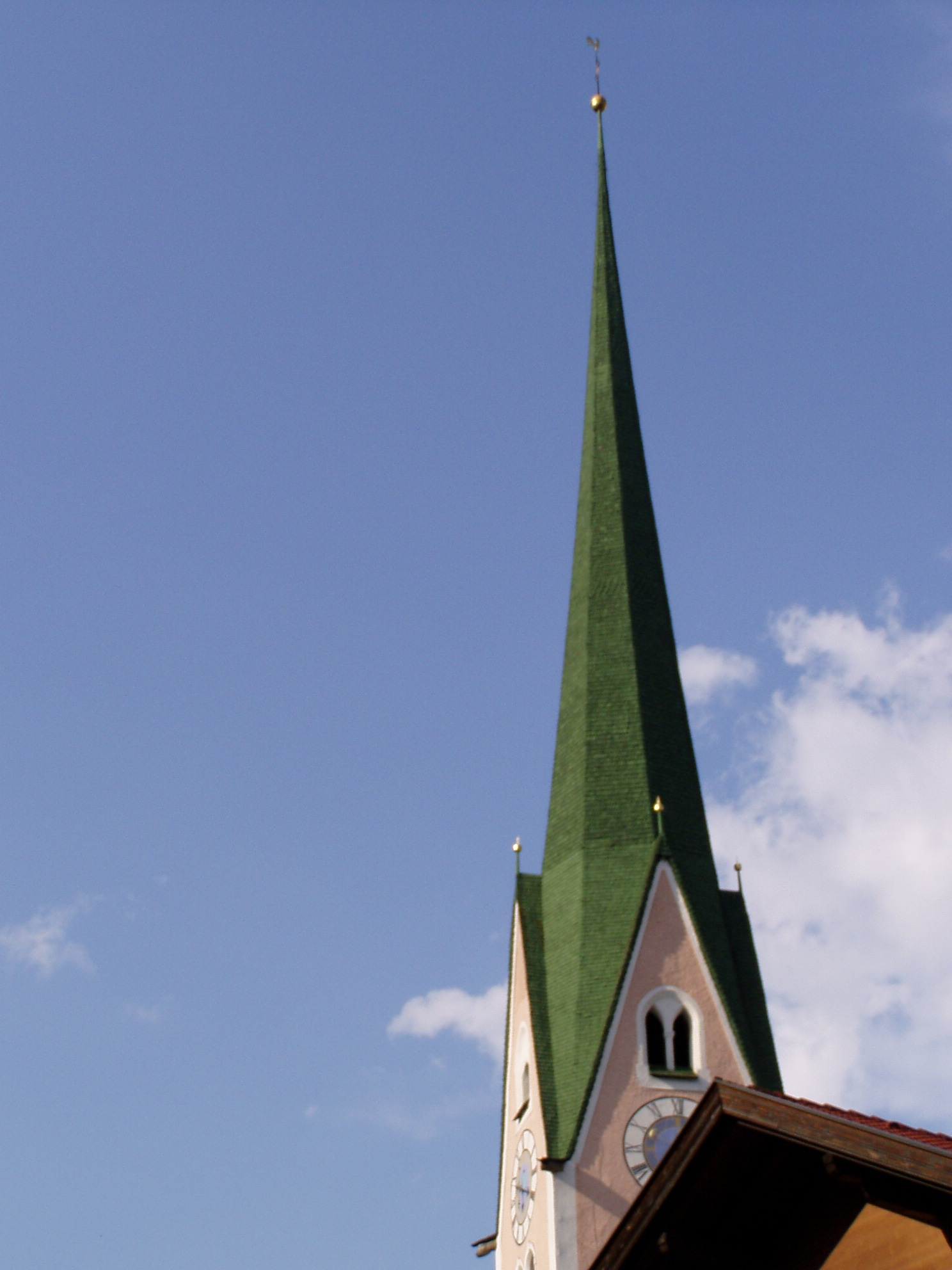 Photographie personnelle du clocher tors (très peu tordu) de l'église paroissiale de Zell-am-Ziller prise par Accrochoc le 06 juillet 2006 lors d'un voyage en Autriche.